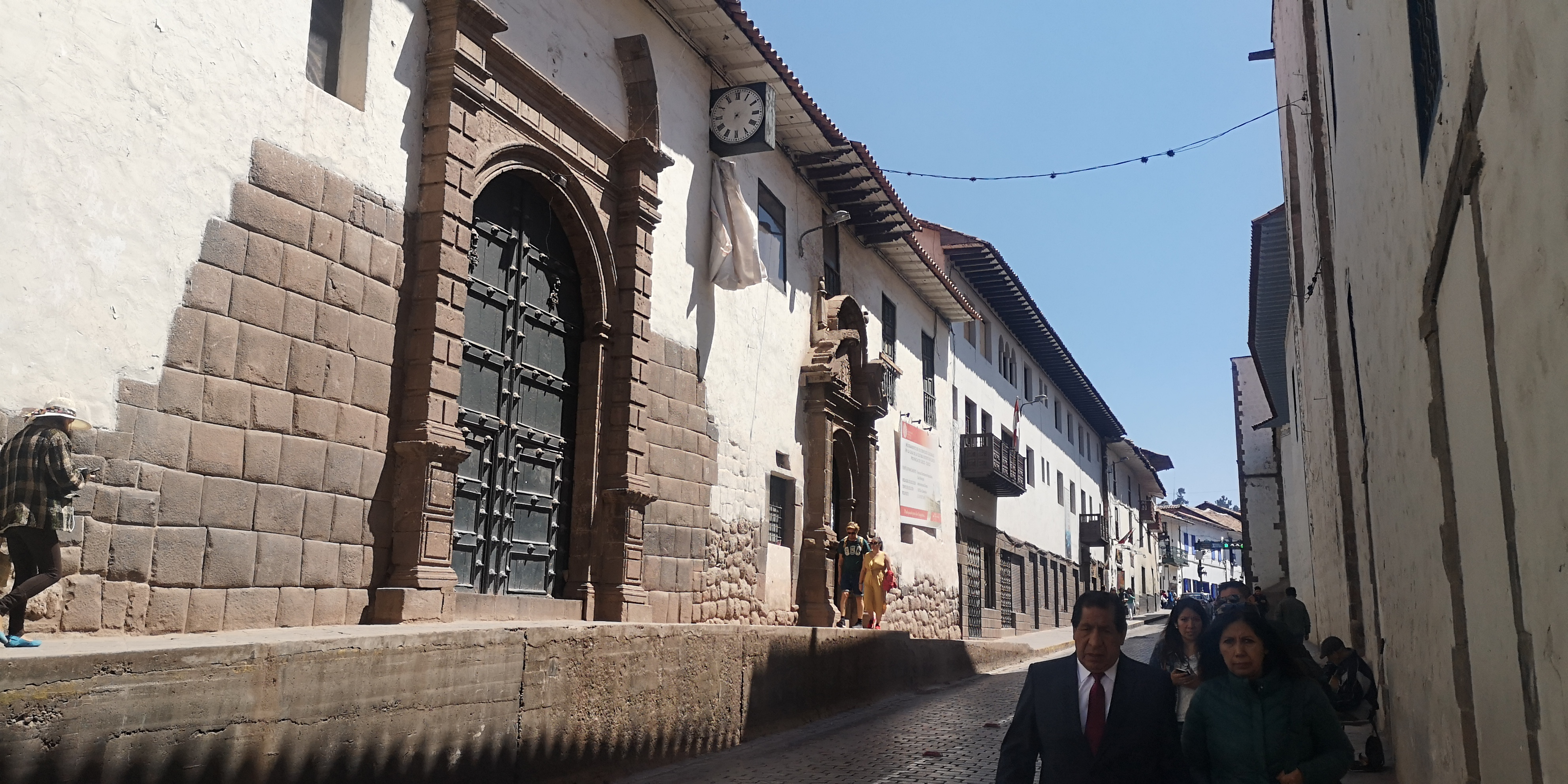 Vista de la puerta principal del local del antiguo Colegio San Bernardo del Cusco y de la calle San Bernardo. Cusco, Perú.